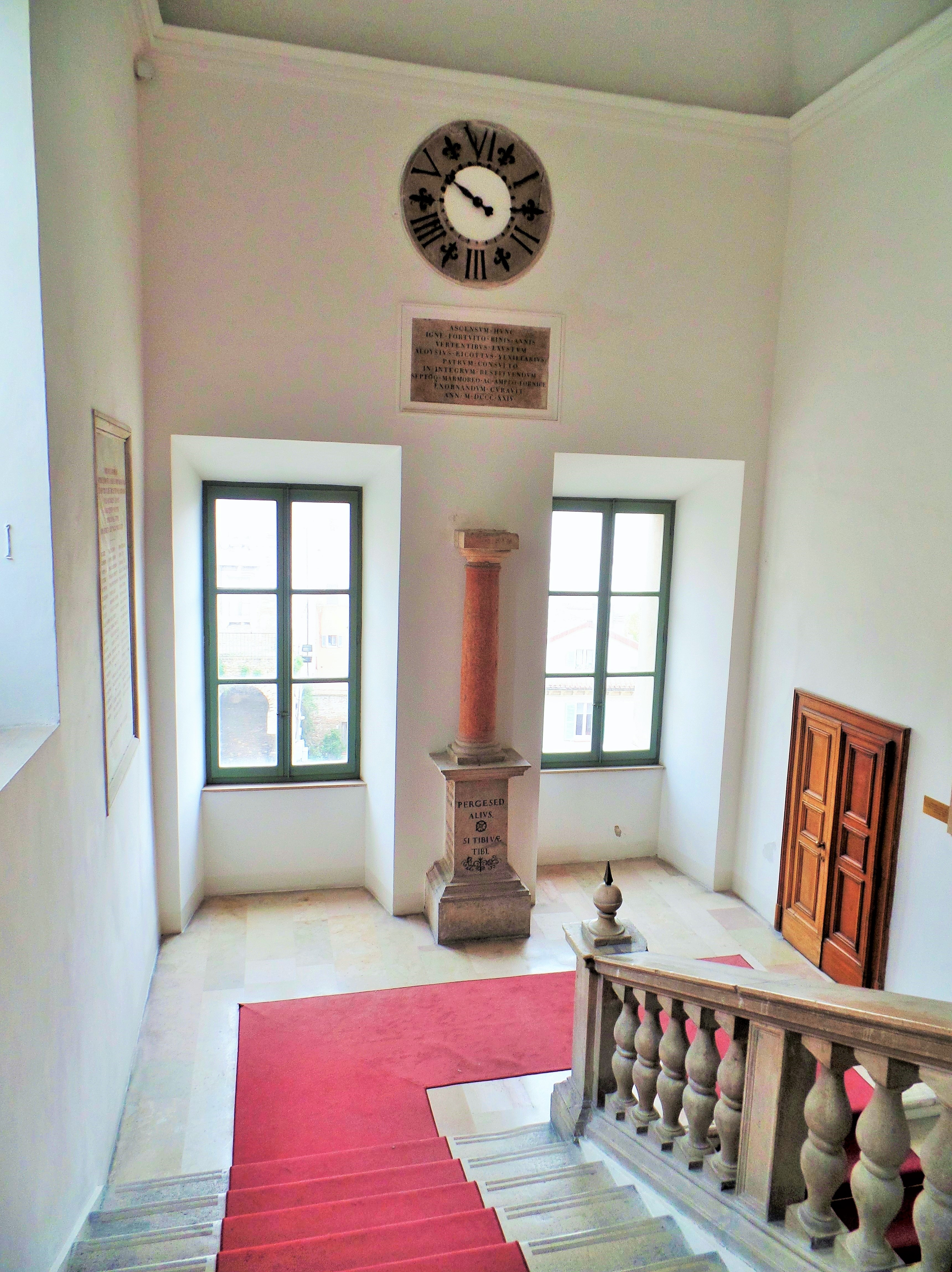 Palazzo degli Anziani Ancona scala 1 This is a photo of a monument which is part of cultural heritage of Italy.